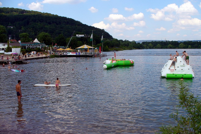 Übersicht über den Seepark Niederweimar